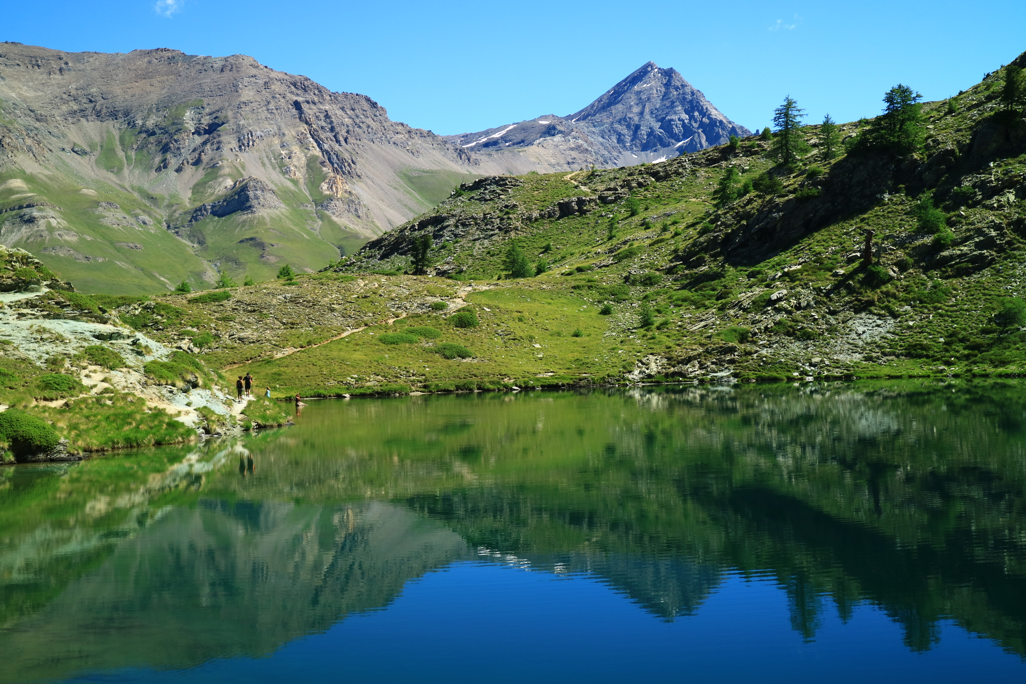 Paesaggio alpino nella Val di Cogne, con il Lago di Loye in primo piano e la Punta Tersiva sullo sfondo. Fotografia realizzata nel contesto del progetto LIFE PastorAlp